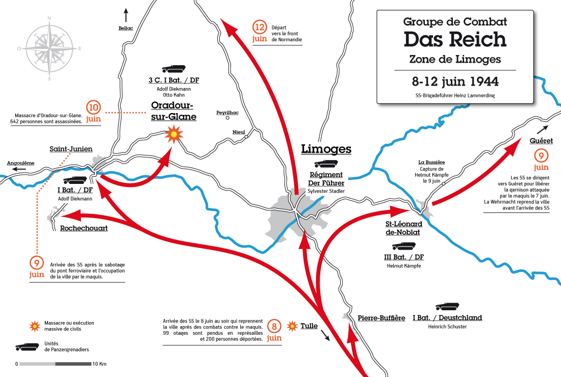 Déploiement de la 2e division SS Das Reich dans la zone de Limoges, prélude au massacre d'Oradour-sur-Glane le 10 juin 1944